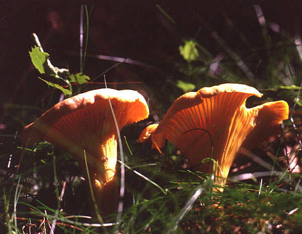 Chanterelle Cantarellus cibarius)